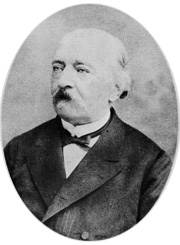 Porträt von Karol Mikuli